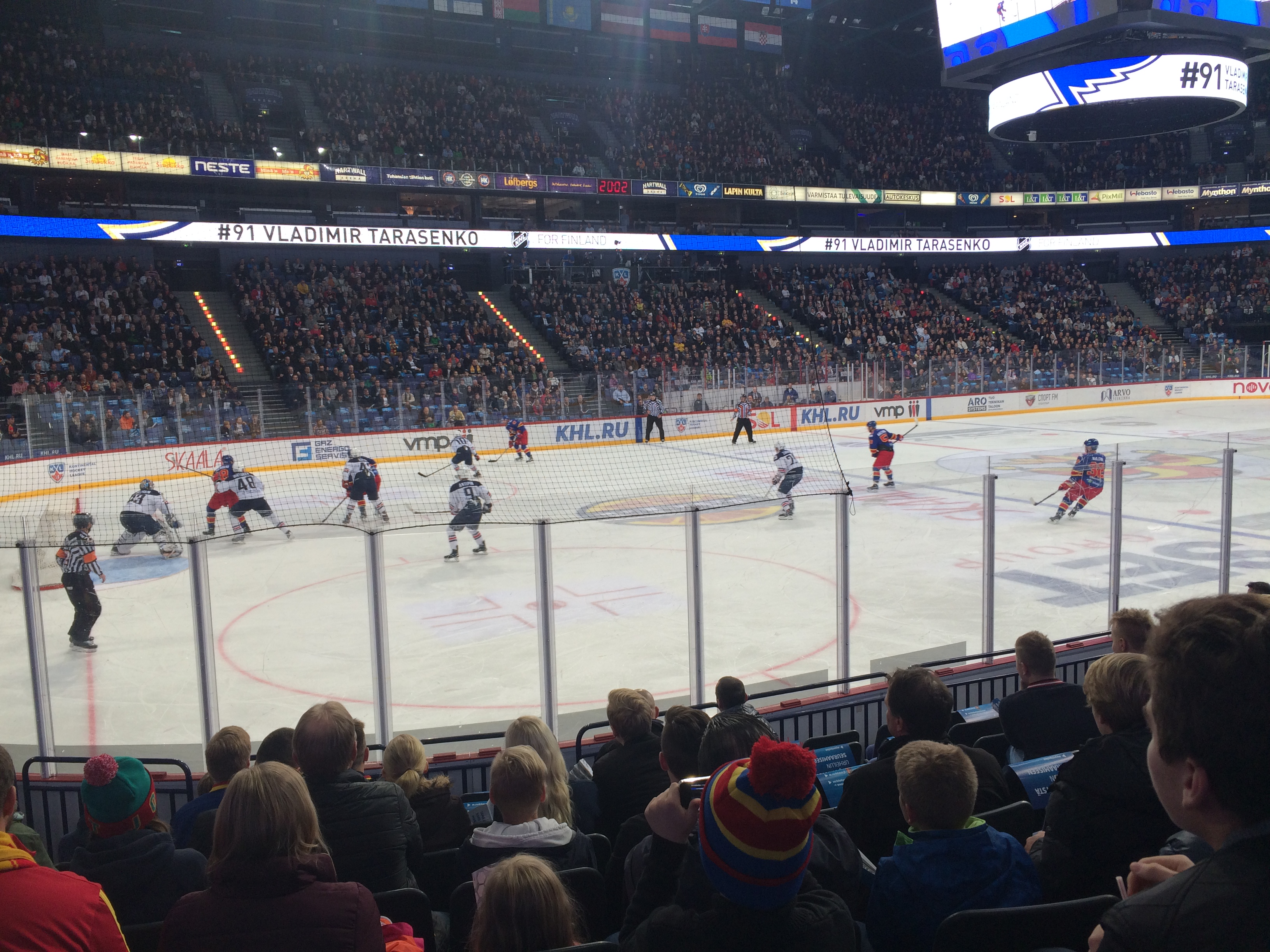 Jokerit Helsinki vs. Metallurg Magnitogorsk.